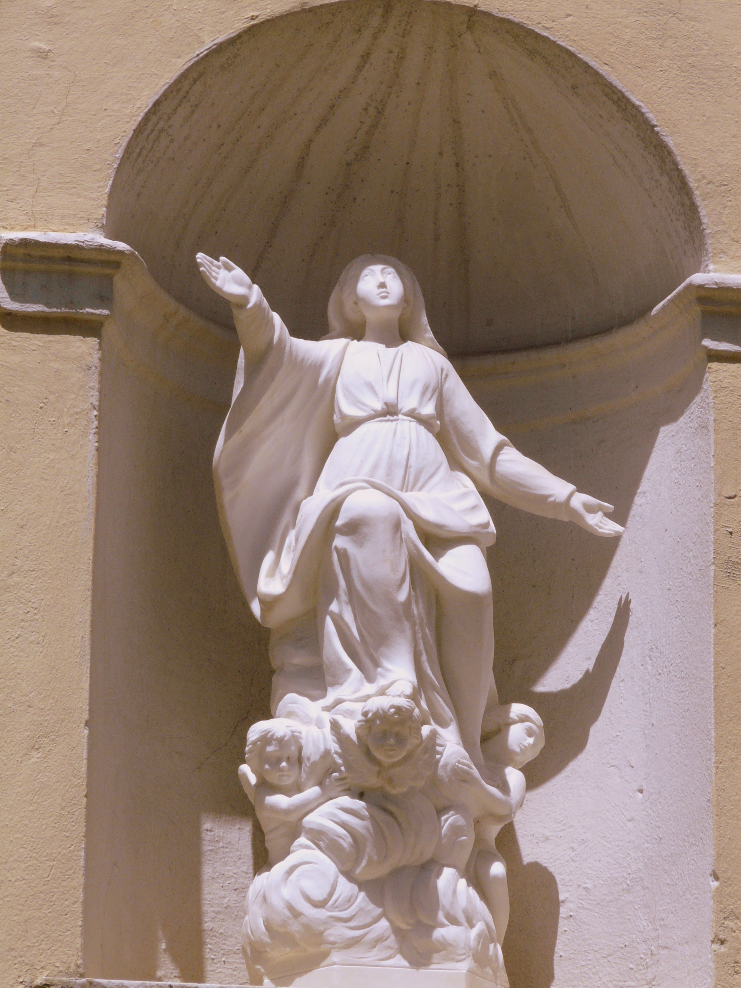 La stuata dell'Assunta sopra l'ingresso laterale della pieve di Santa Maria Assunta, Pignone, Liguria, Italia